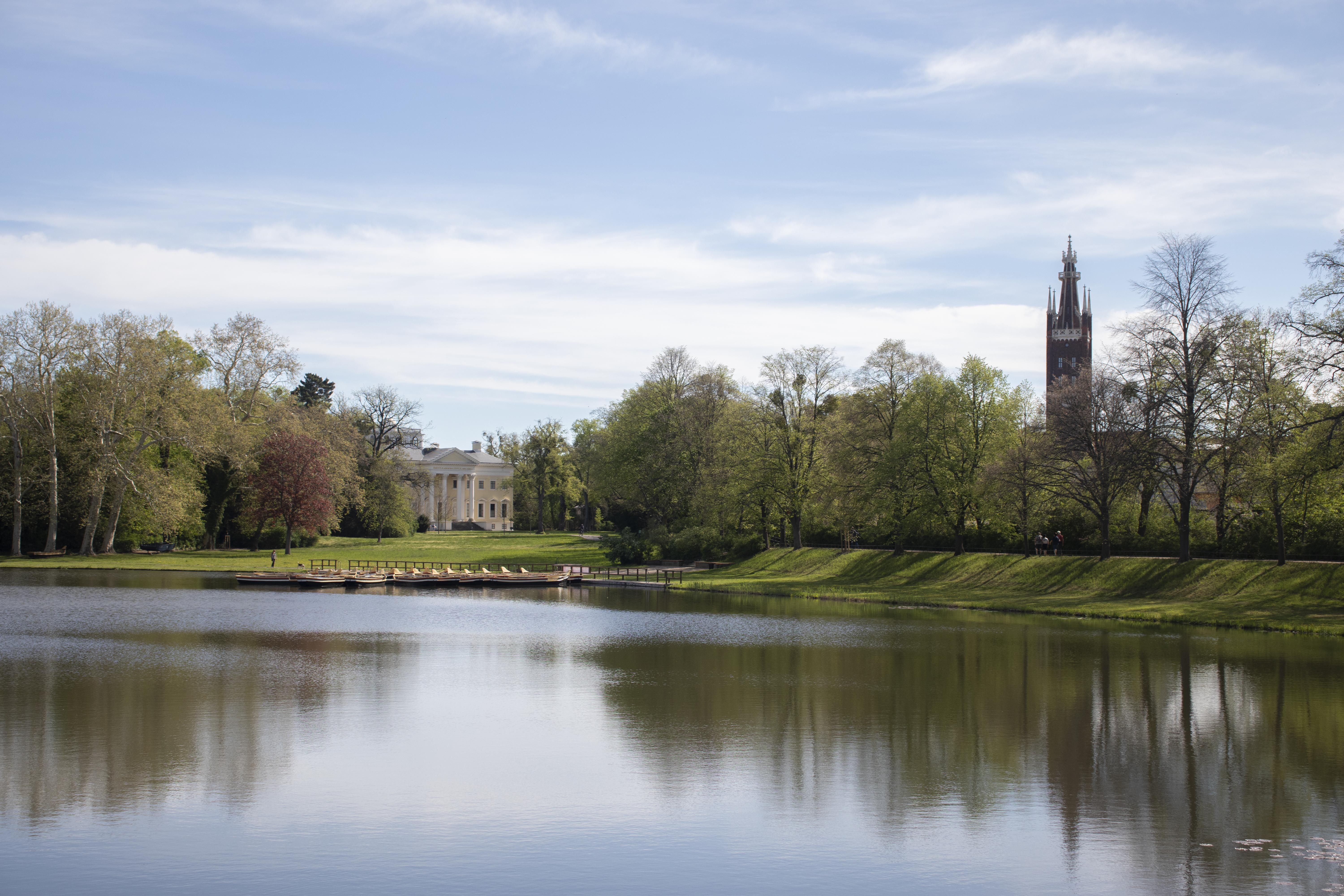 Zusehen ist der Wörlitzer See im Wörlitzer Park zur Frühlingszeit. Auch hier spiegeln sich Form und Farben durch die Windstille wunderschön im Wasser.